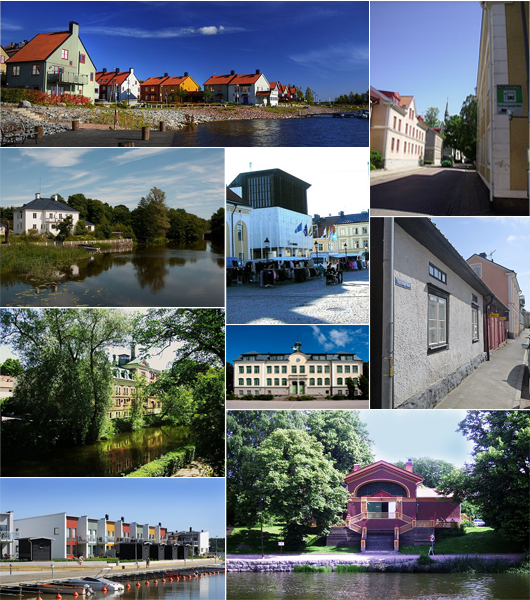 Sammanfogning utav flera olika mediefiler på Commons för att användas i Nyköpingsartiklar.